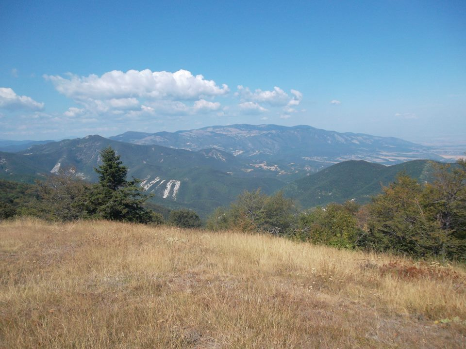 Гледка от "Дълга поляна"